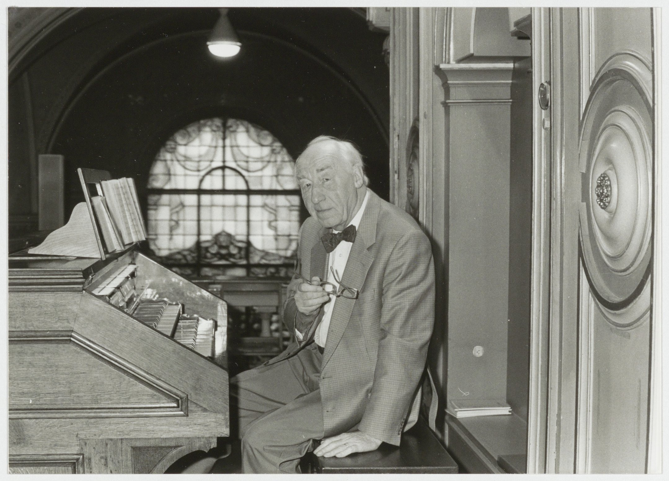 CollectieCollectie Fotoburo de BoerInventarisnummerNL-HlmNHA_54035289NL-HlmNHA_1478_40192KBeschrijvingAlbert de Klerk zestig jaar organist in de R.K. Sint Josephkerk.FotonummerNL-HlmNHA_1478_2375DocumenttypePortrettenVervaardigerHouts, Nils van (UP de Boer) Soort vervaardigerFotograaf Interieur/ExterieurinterieurAnnotatiesHD270994PersonenKlerk, Albert de LandNederland ProvincieNoord-Holland GemeenteHaarlem PlaatsHaarlem StraatJansstraat GeografischCentrum Begindatum09-1994Einddatum09-1994TechniekFoto Trefwoordenkerkorgels, Kerken, jubilea